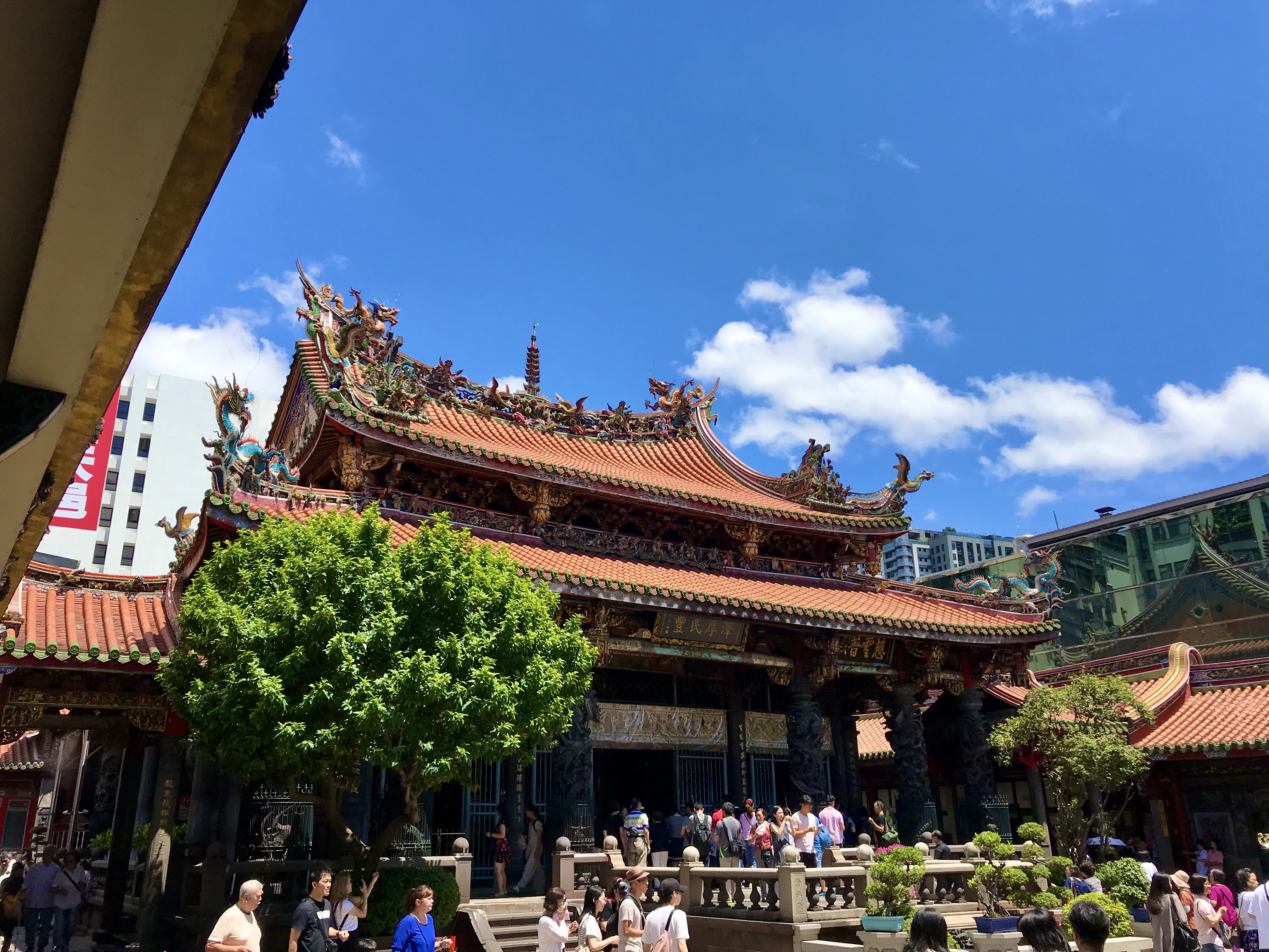 中文（台灣）: 艋舺龍山寺正殿